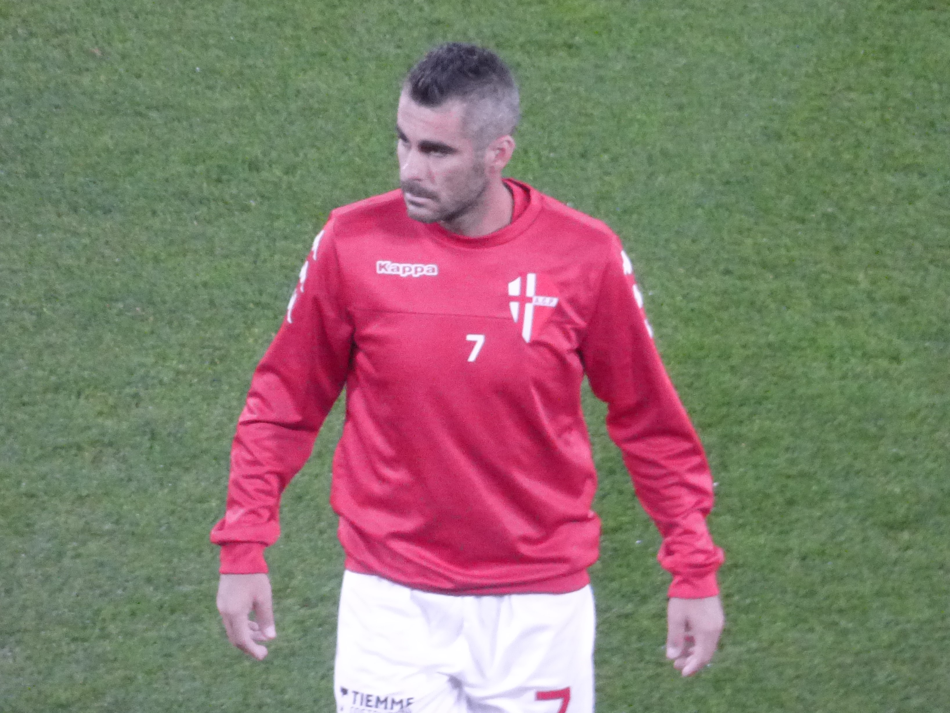 Nico Pulzetti lors du match amical RC Lens - Calcio Padova, le 11 octobre 2018 au Stade Bollaert-Delelis de Lens.